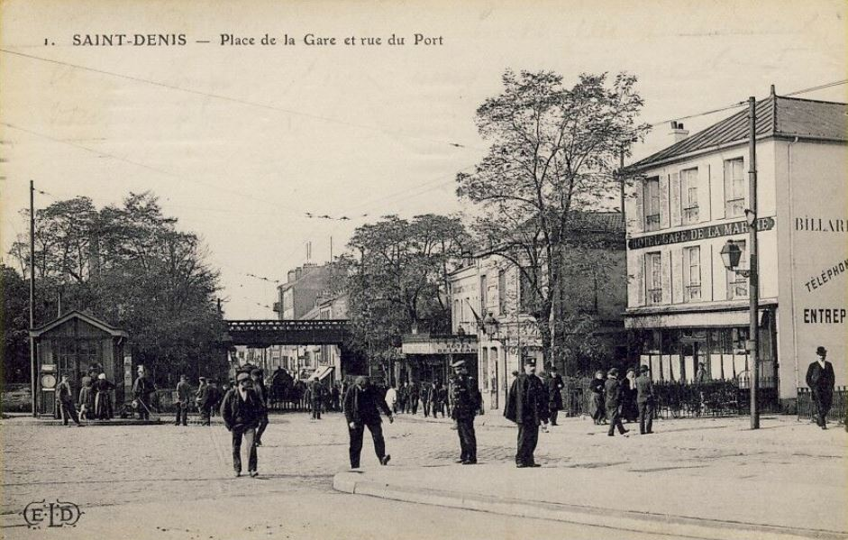 Saint-Denis.Rue du Port.Place de la Gare